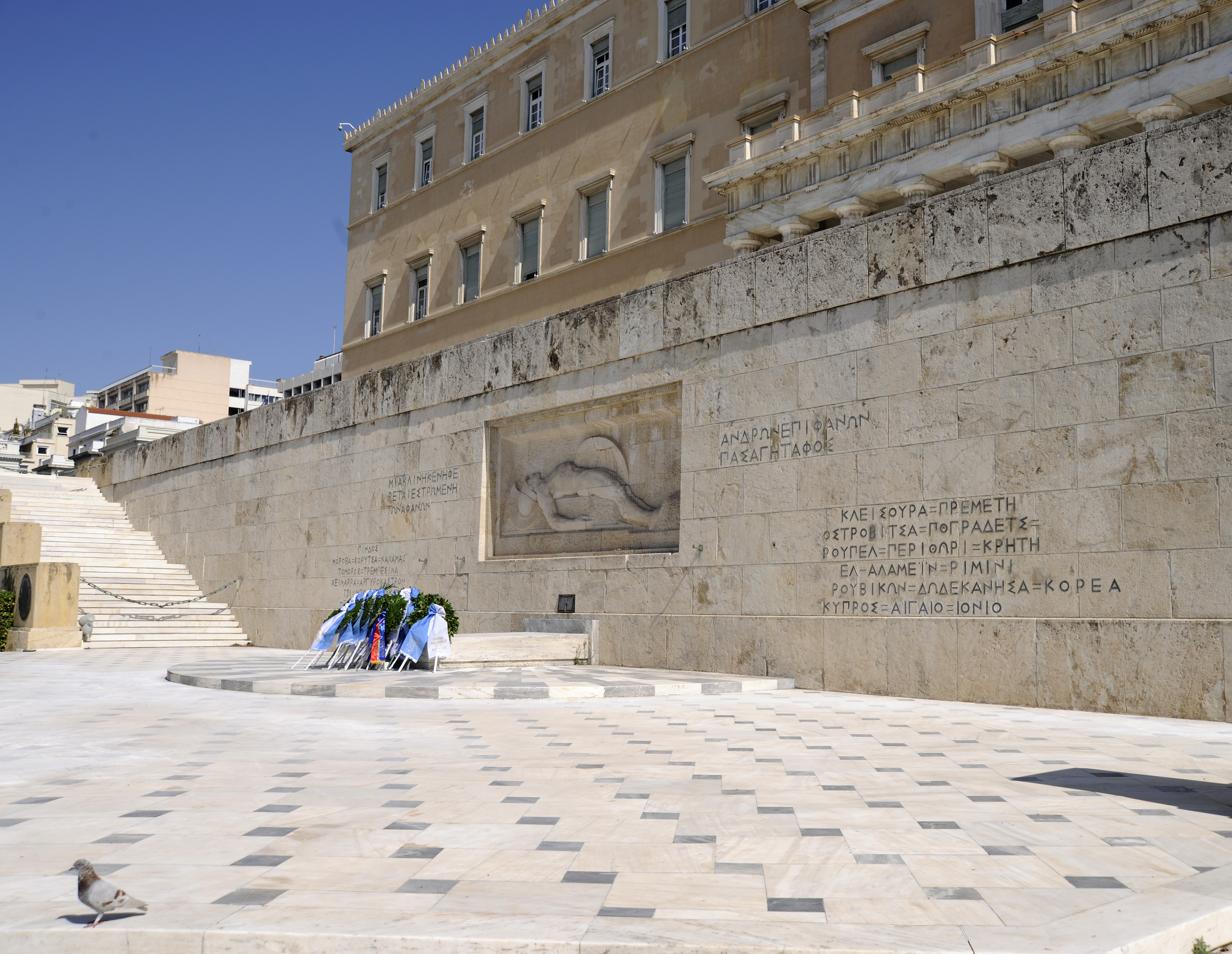 Άποψη Μνημείου Αγνώστου Στρατιώτη στο Σύνταγμα«Μνημείο Αγνώστου Στρατιώτου»